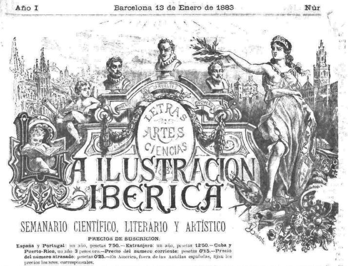 Primer logotip de la revista La Ilustración Ibérica (Barcelona, 13 de gener de 1883) revista num.1